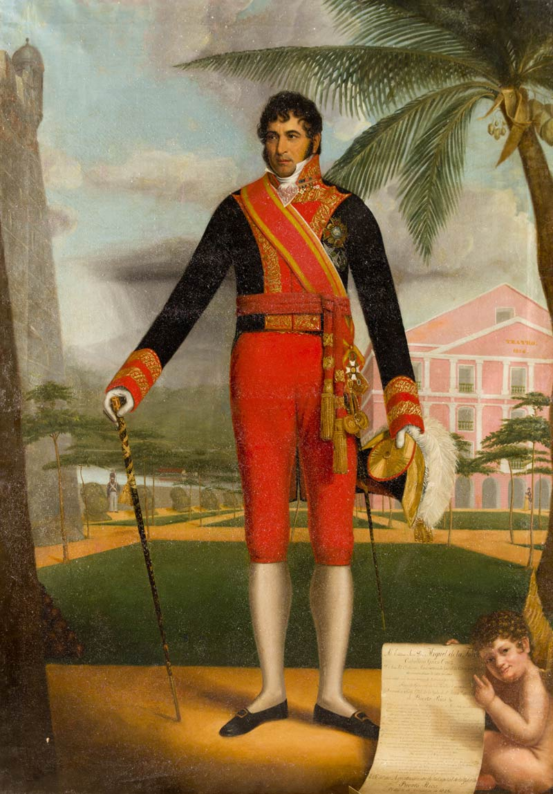 Retrato de D. Miguel de la Torre, de cuerpo entero, en un paisaje Óleo sobre lienzo. 230 x 162 cms. Firmado y fechado en 1826.